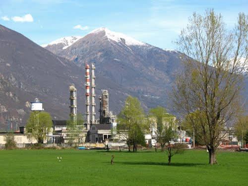 The chemical plant of Pieve Vergonte founded in the years between 1915 and 1920